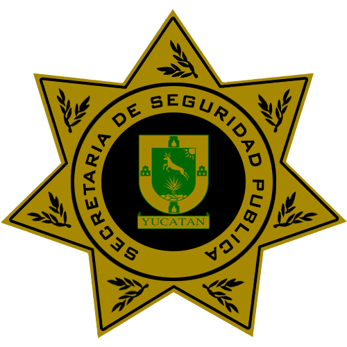 Escudo de la Secretaría de Seguridad Pública del Estado de Yucatán, usado en sus vehículos sin franja amarillo-dorada.